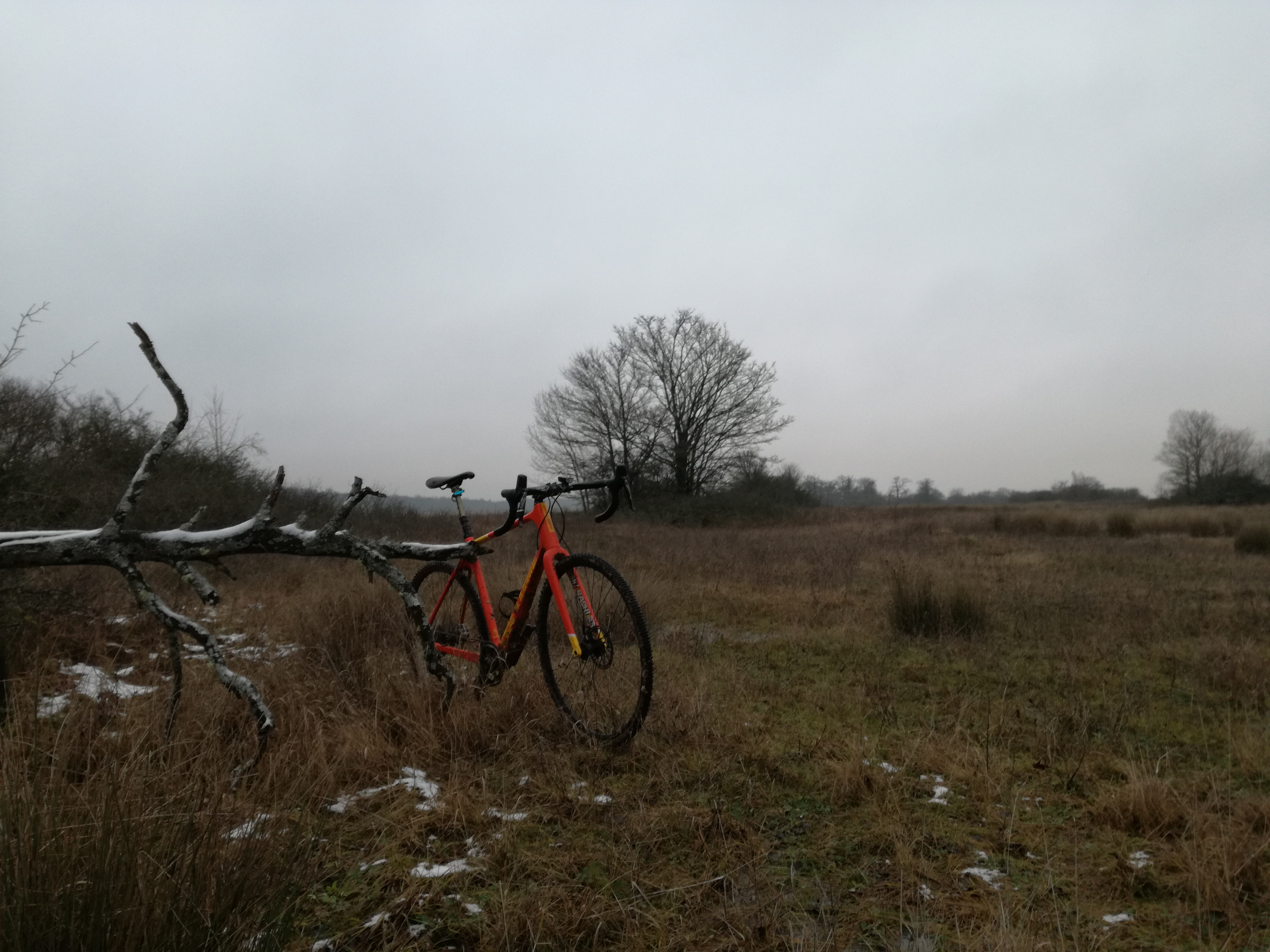 BBB Brönnhof 1